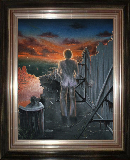 Illustration créée pour faire le dos de l'album Hollywood de Johnny Halliday